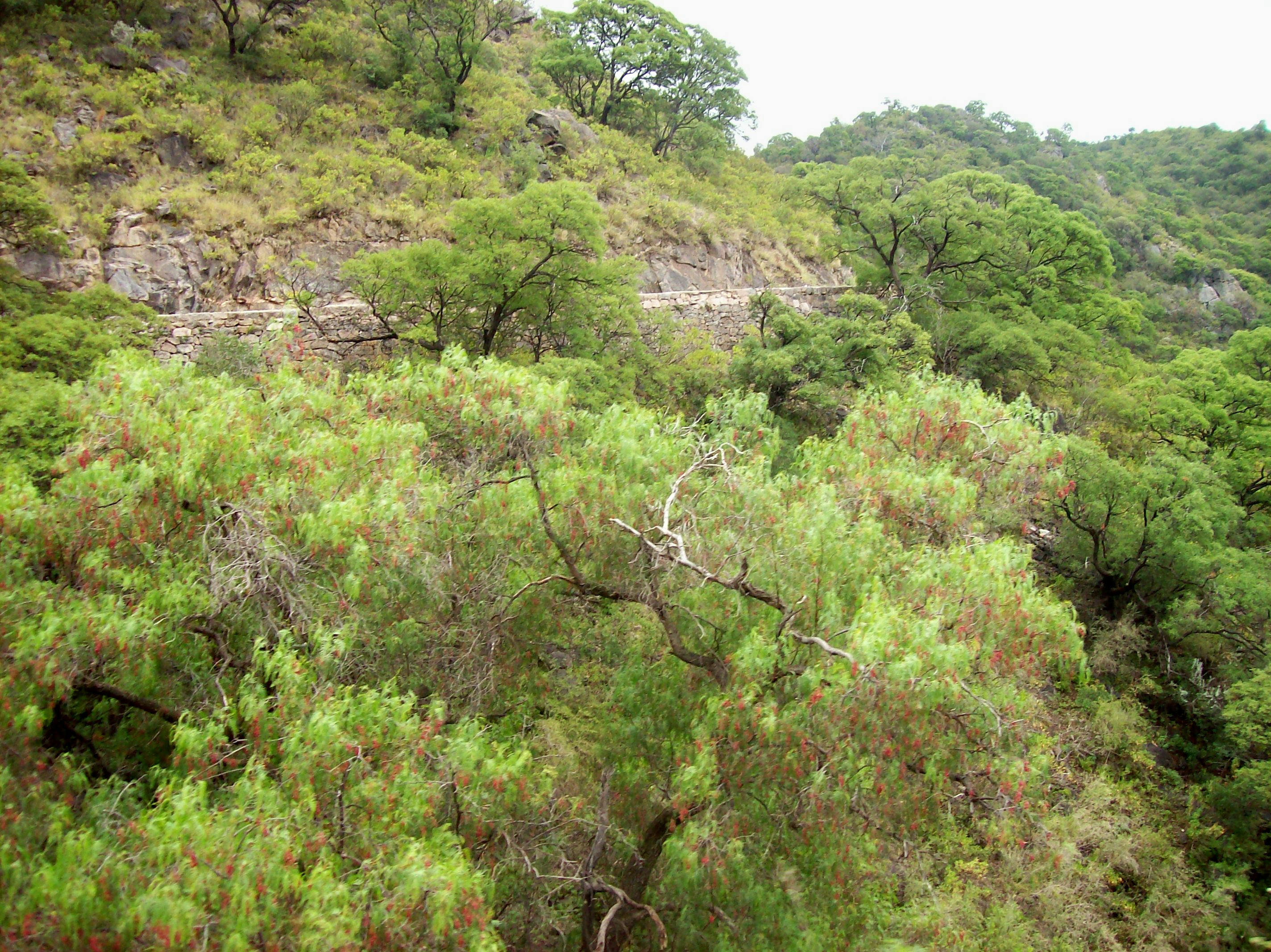 Camino a San Marcos Sierra , en las Sierras de Cuniputo (también llamada del Perchel) en la provincia de Córdoba, Argentina. Las coordenadas geográficas son aproximnadas, con un error menos a 3 km